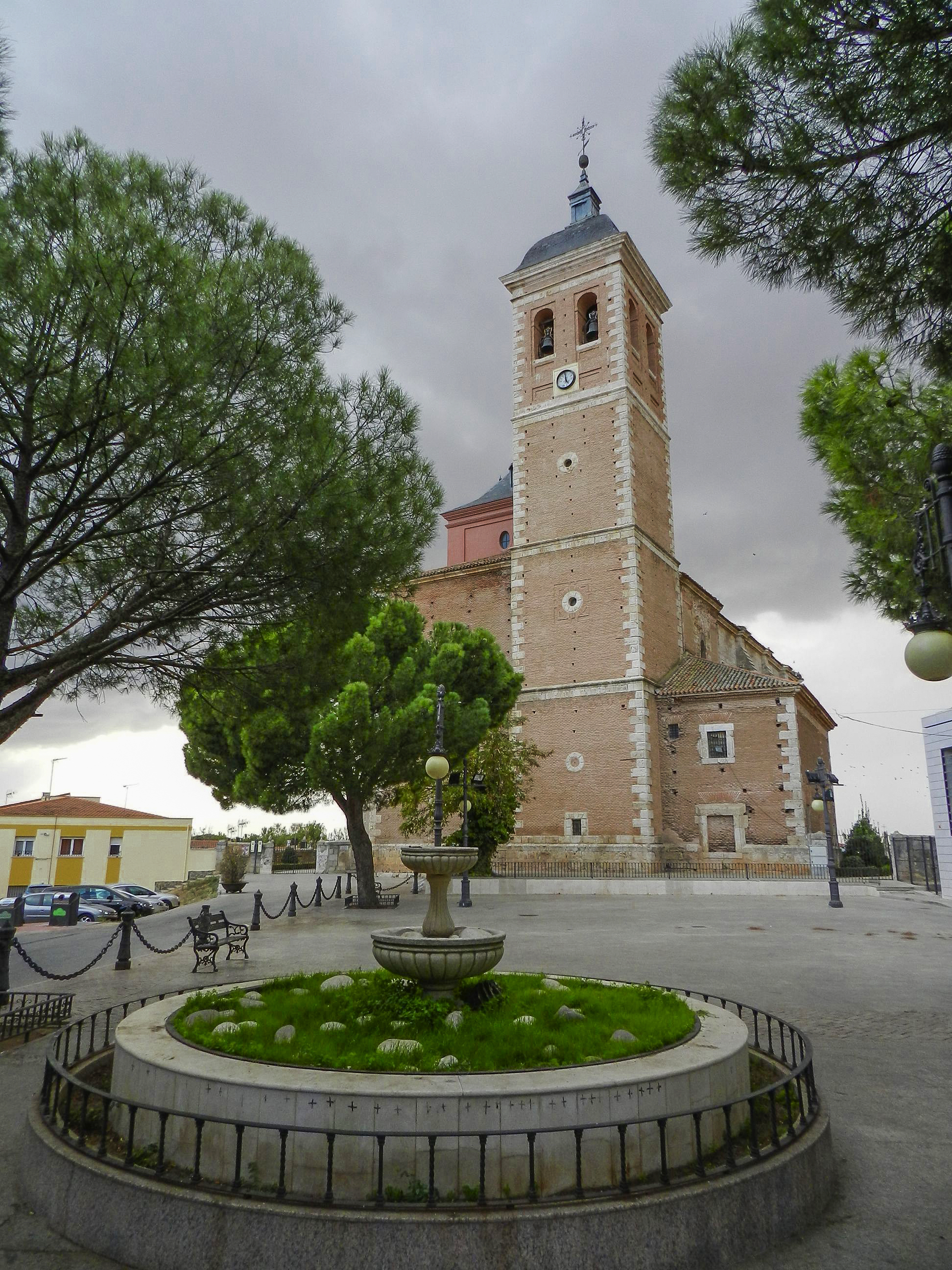 Vista este desde la plaza con fuente